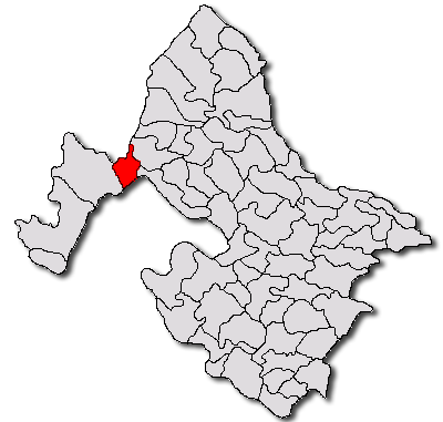 Categorie:Hărţi ale judeţului Mehedinţi